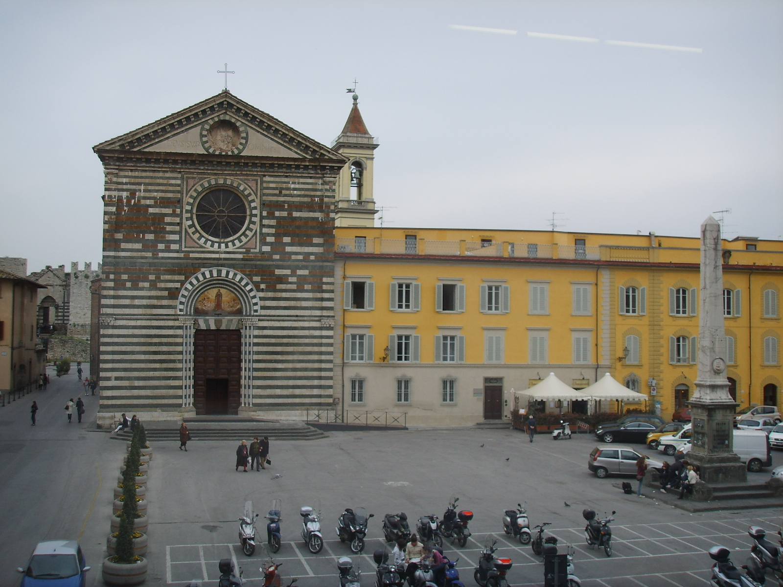 Prato, piazza san francesco